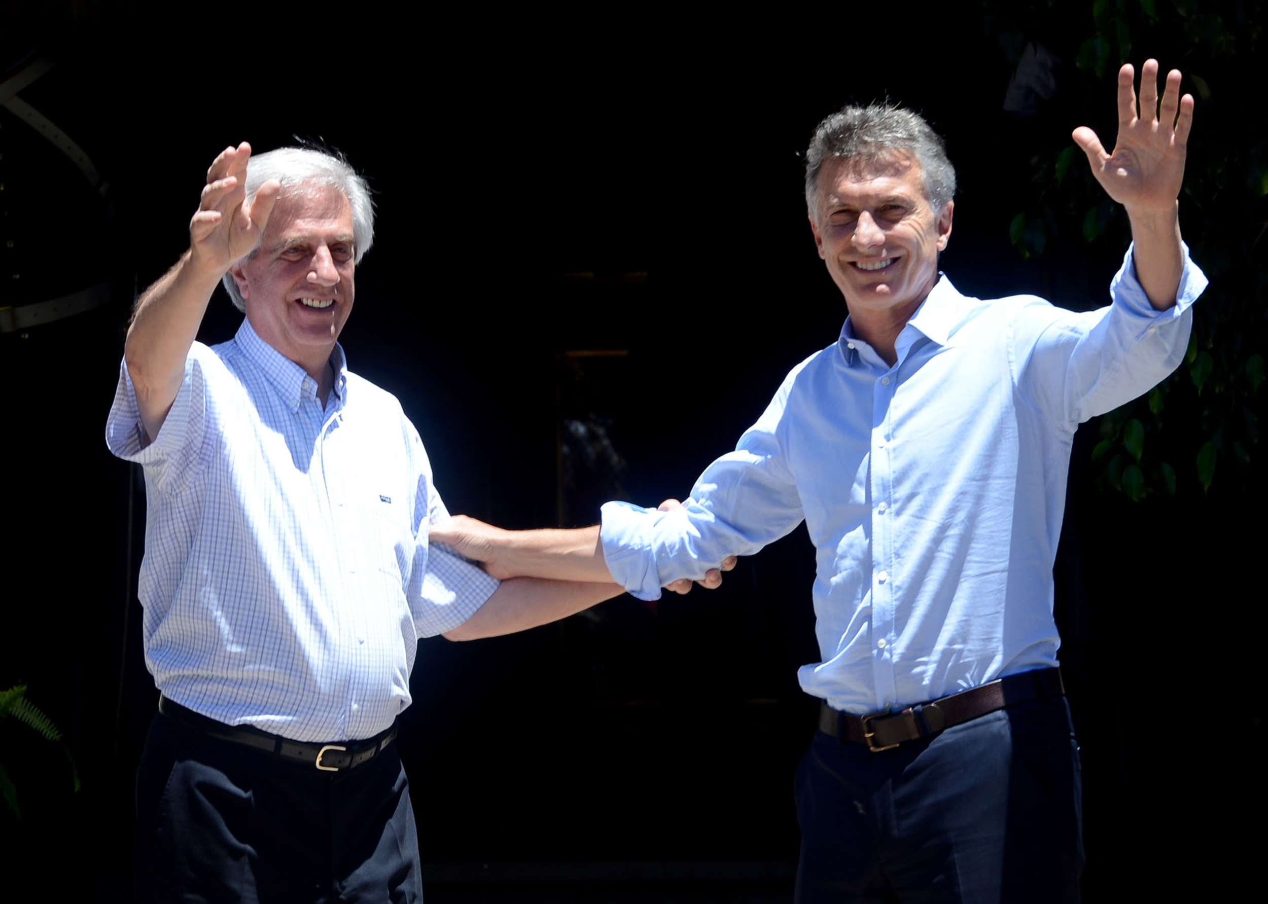 El presidente Mauricio Macri se reunió con su par de la República Oriental del Uruguay Tabaré Vázquez, en la residencia de Parque Anchorena (Colonia, Uruguay), donde ambos mandatarios compartieron un almuerzo el 7 de enero de 2016, y dialogaron sobre las relaciones bilaterales.